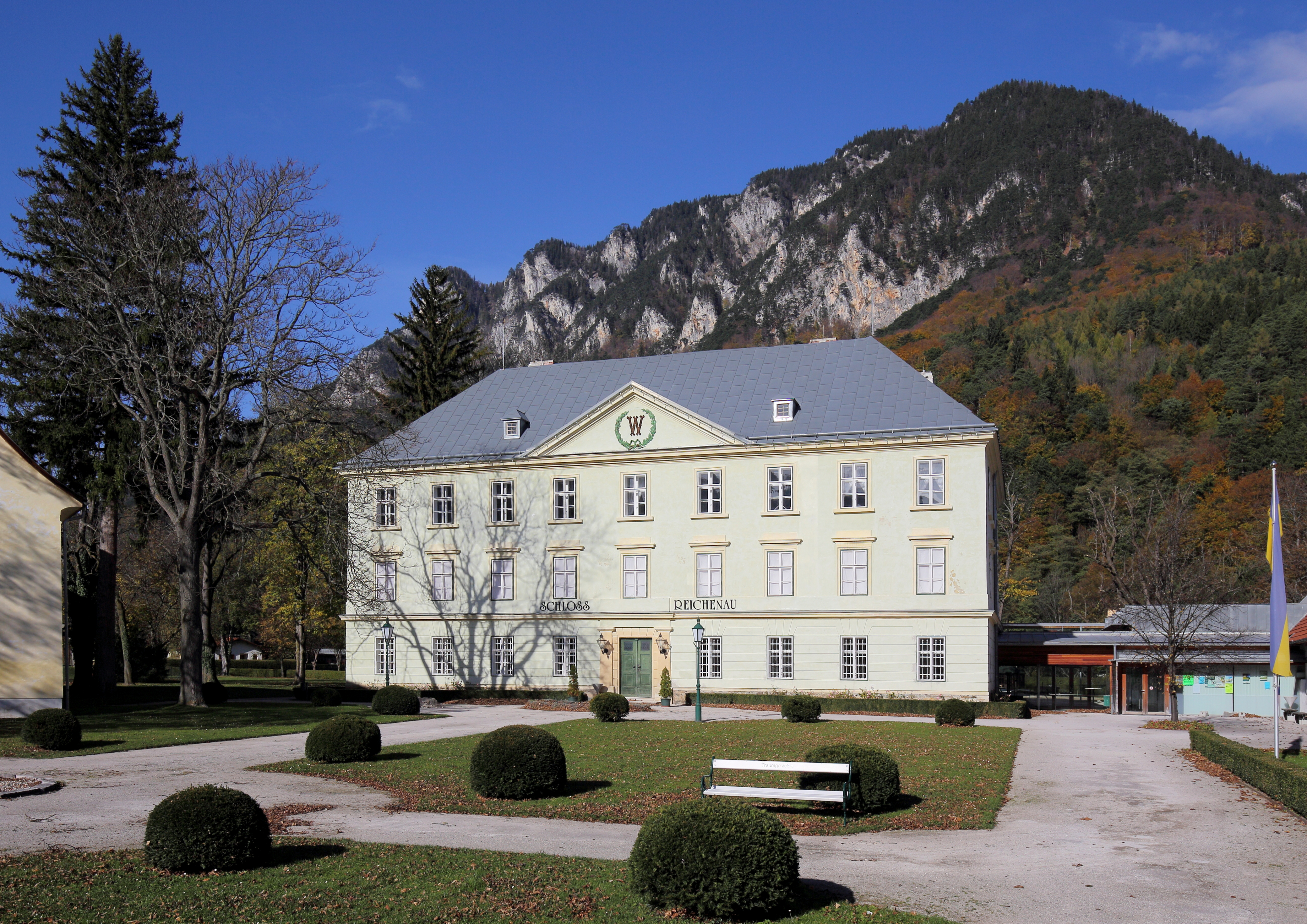 Südsüdostansicht des Schlosses Reichenau in der niederösterreichischen Marktgemeinde Reichenau an der Rax.Eine dreiflügelige Anlage mit mächtigem Eckturm im Nordwesten. 1829/30 wurde nach Plänen von Jacob Aigner das Schloss prägend umgebaut und Zubauten errichtet. Unter anderem wurde der dominierende Eingangstrakt im Süden unter Belassung der Fundamente neu errichtet. Im Hintergrund der Feichtaberg (1381m).